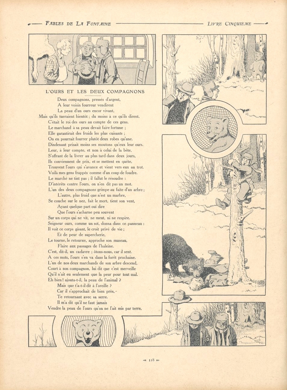 Fables de La Fontaine illustrées par Benjamin Rabier : L'ours et les deux compagnons.